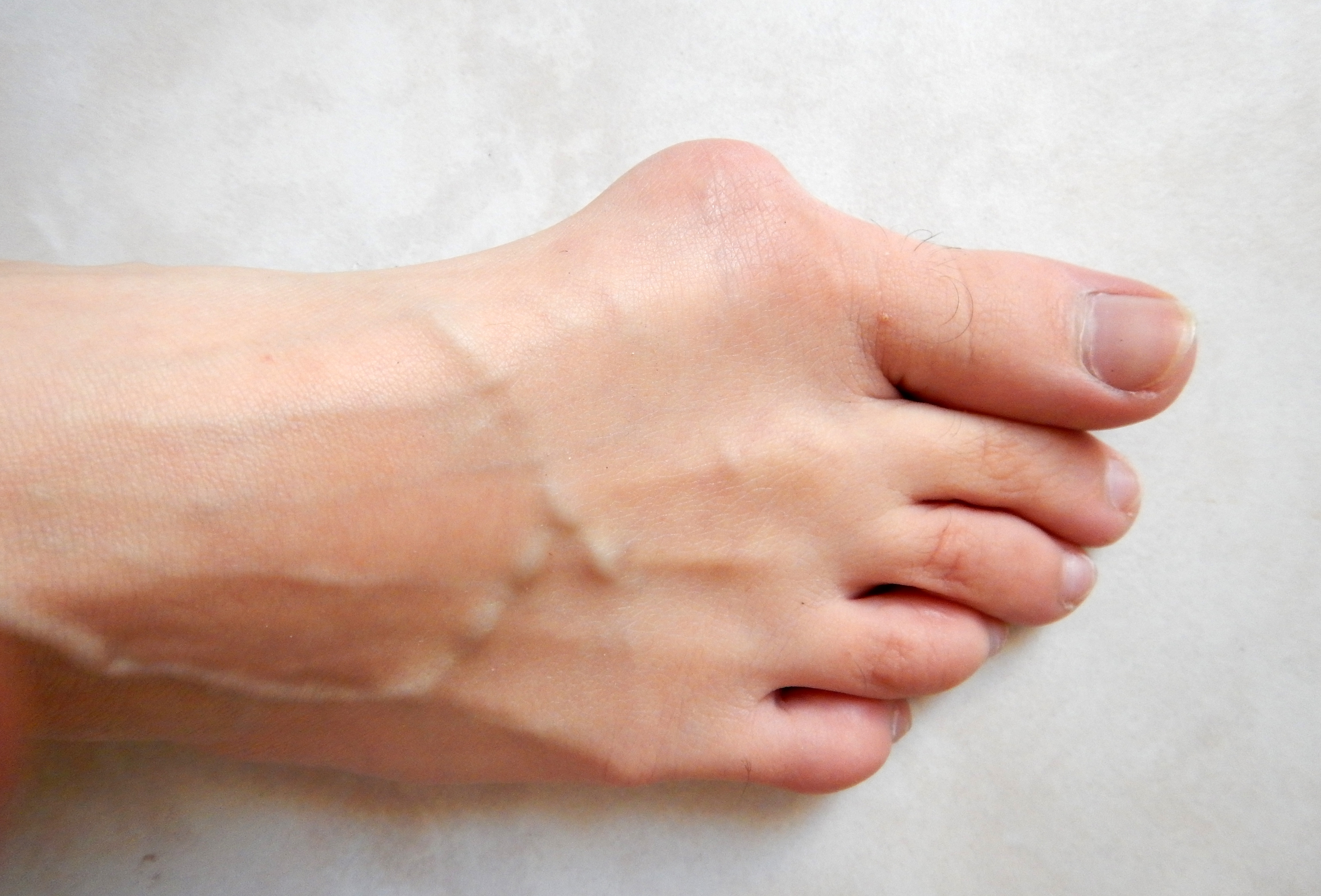 Hallux valgus chez un sujet de 24 ans environ